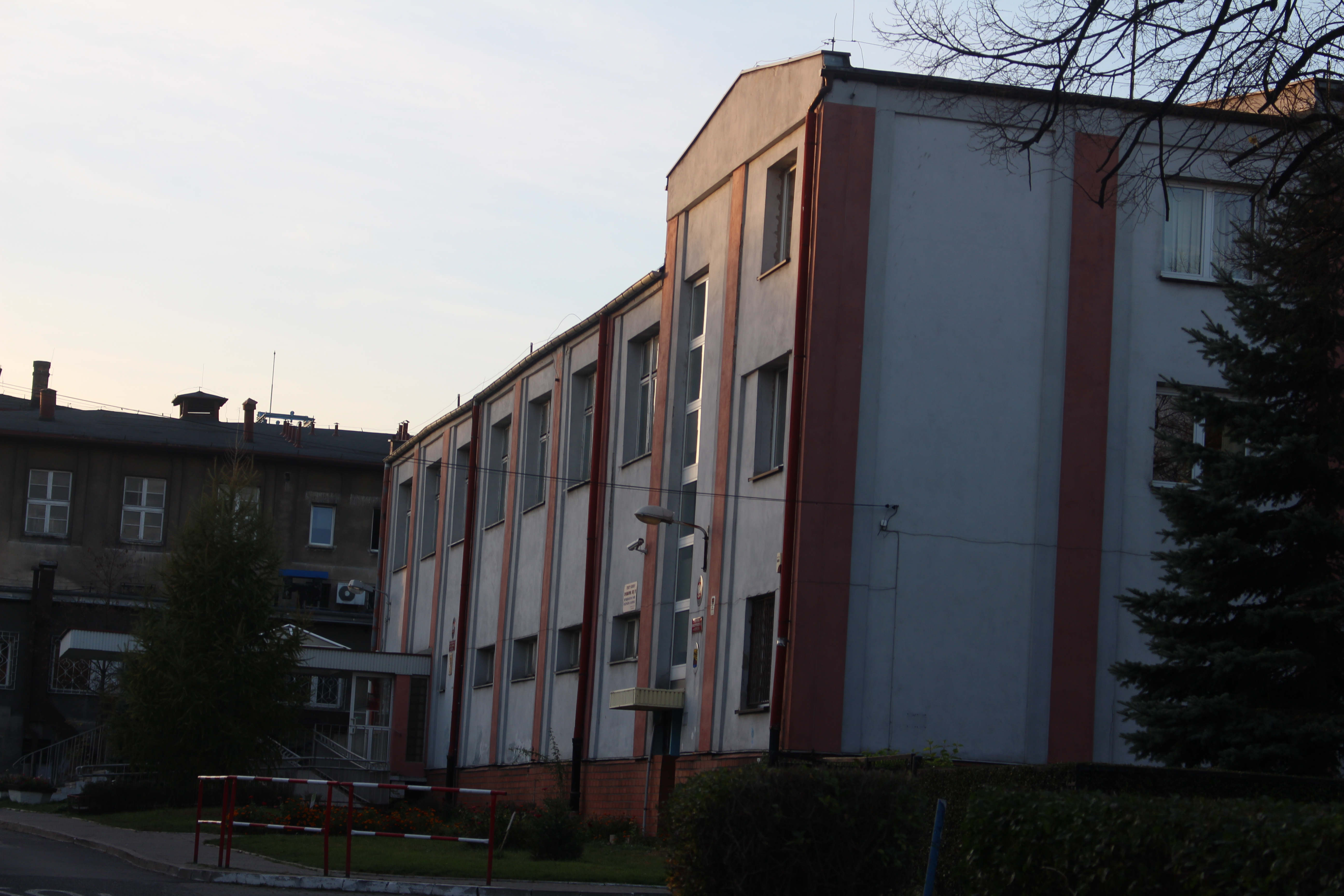 nowy budynek szkoły przy ul. Szopienickiej